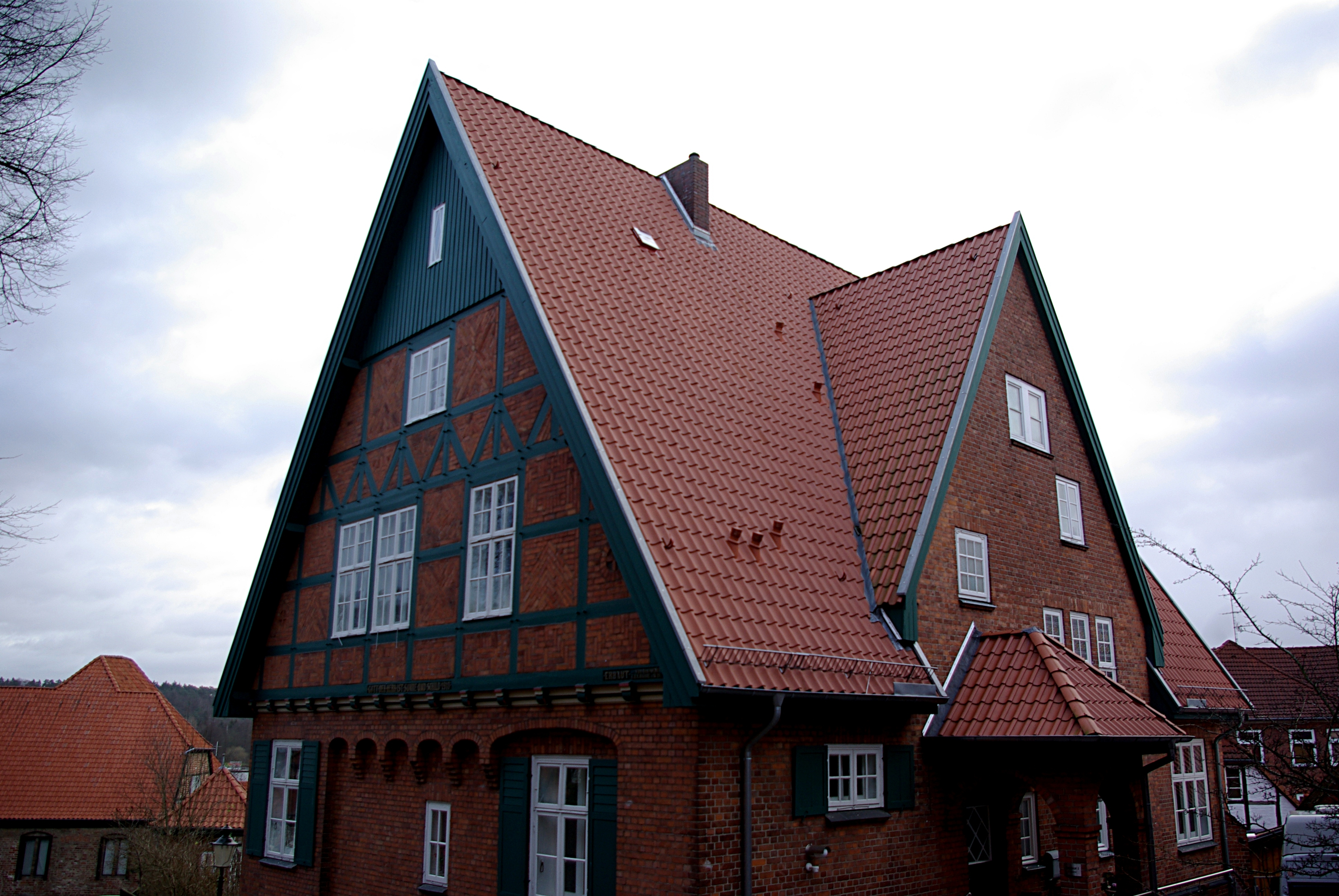 Mölln in Schleswig-Holstein. Das Haus Am Markt 10 (Pastorat) steht unter Denkmalschutz.